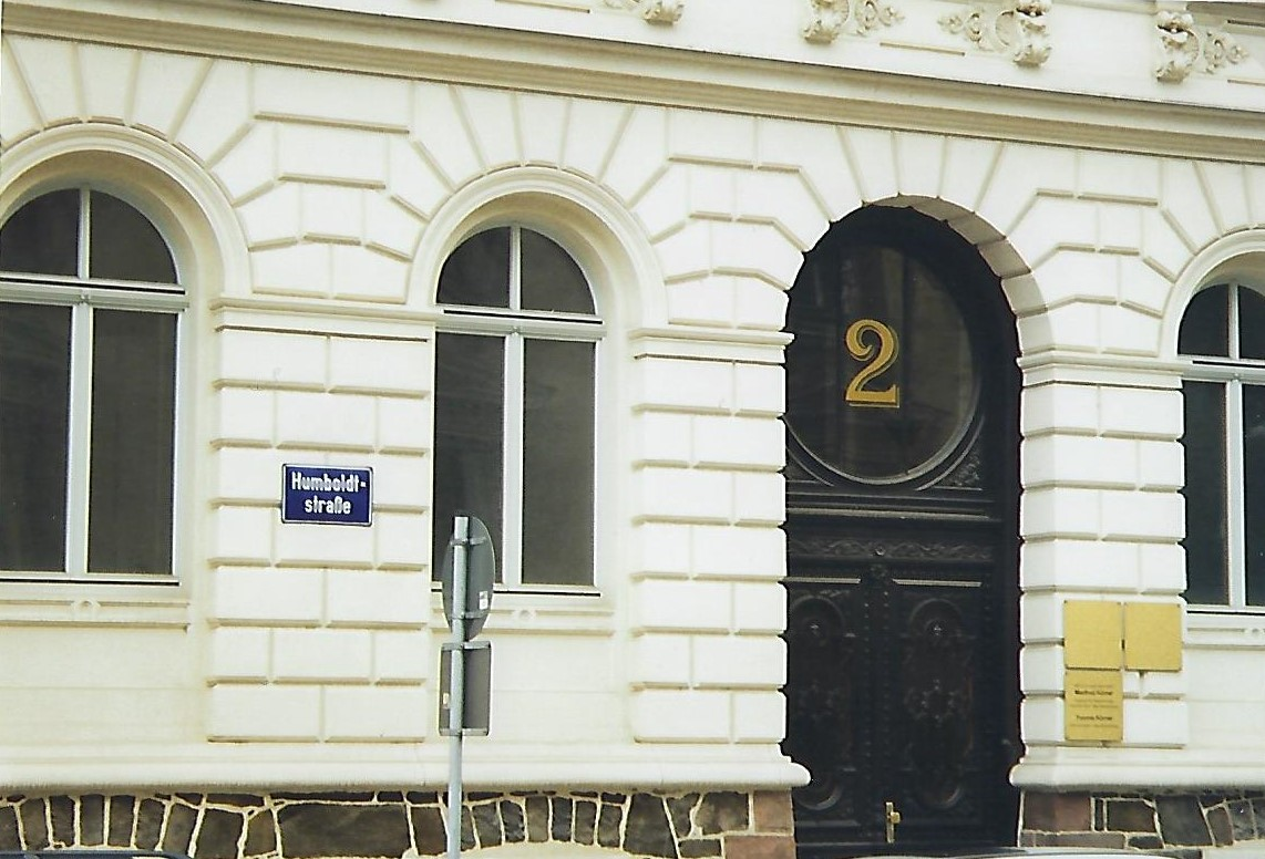 Renoviertes ehemaliges Korporationshaus der Alsatia in Leipzig